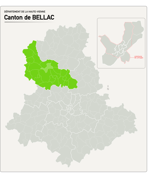 Carte du nouveau canton de Bellac.